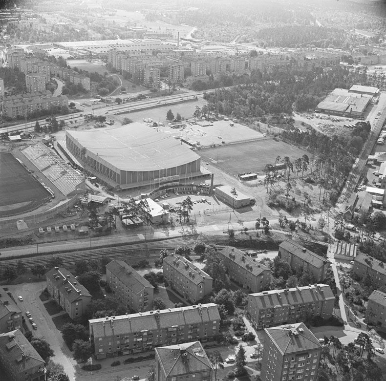 Isstadion/Hovet, Johanneshov. Motiv: Isstadion Nyckelord: Flygbilder Kategori: Stadion, Bostadsområde Isstadion/Hovet, Johanneshov.